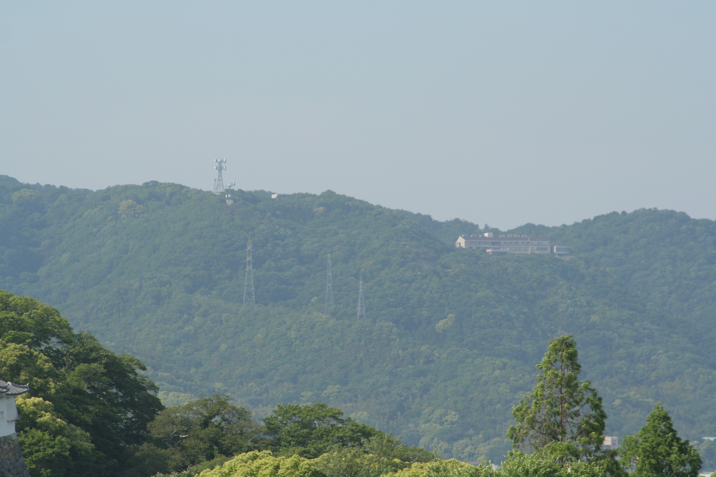 広峰山。イーグレ姫路屋上から撮影。